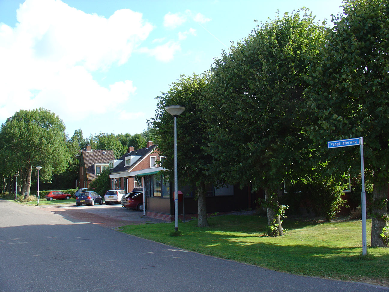 Paapstil nabij Oldenzijl in de provincie Groningen